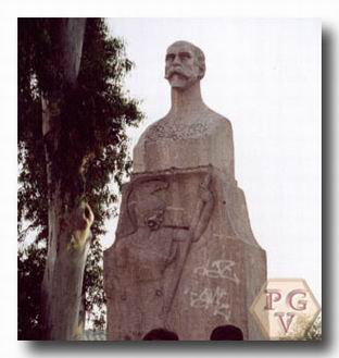 Escultura a Manuel Reina situada en Puente Genil (España) y realizada por el escultor Enrique Moreno Rodríguez.